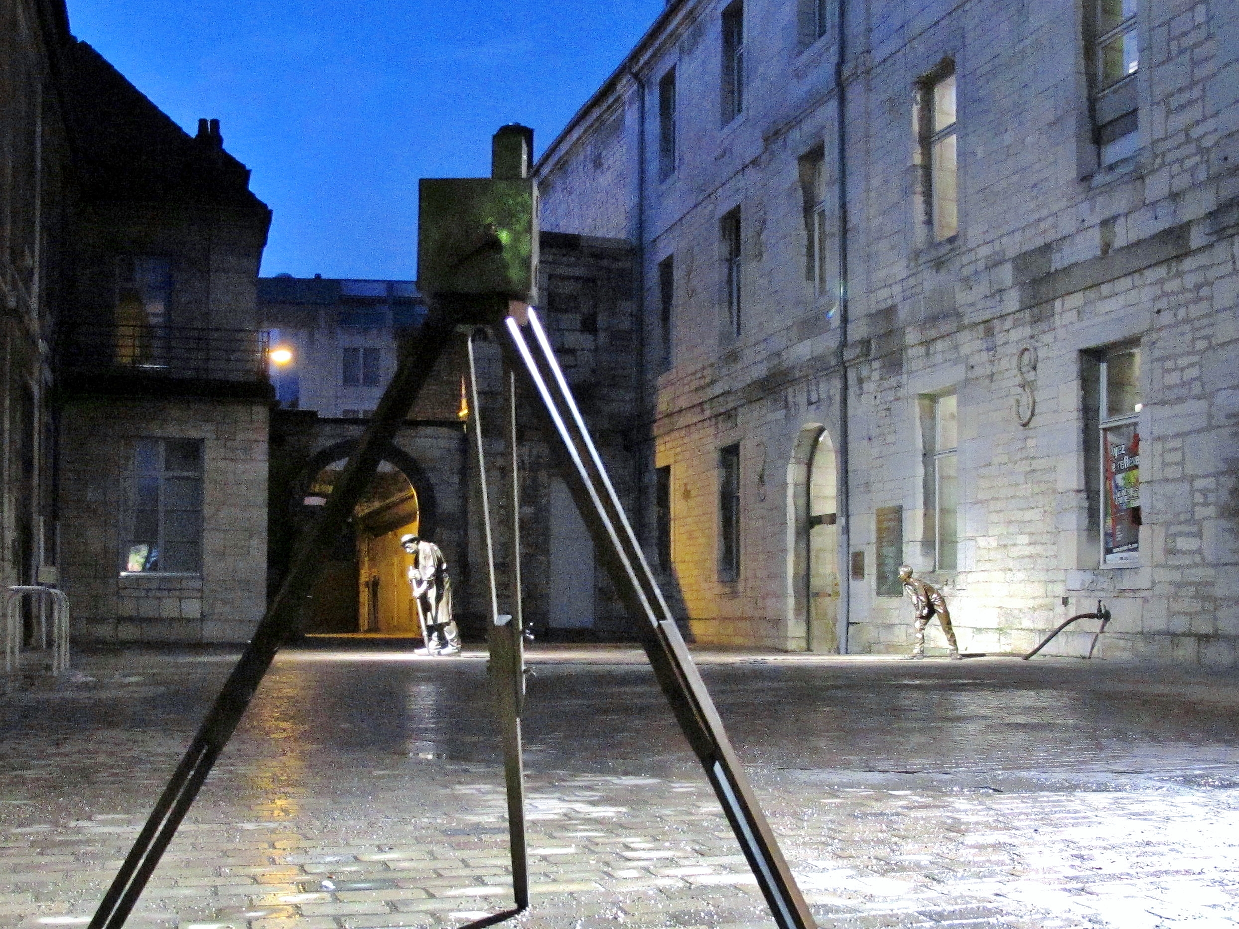 L'arroseur arrosé : sculpture de Pascal Coupot